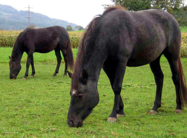 Bildbeschreibung: Arravanis beim Weiden; im Vordergrund Gaia, eine 3-jährige Arravani-Schimmelstute mit Stern; im Hintergrund Athina, eine 2-jährige Arravani-Rappstute ohne Abzeichen. Beide sind Töchter von der Arravanistute Medea. Quelle: selbst fotografiert von Catherine Baumberger Fotograf: Catherine Baumberger Datum: aufgenommen Anfang Oktober 2005 in Eschlikon (Schweiz) andere Versionen: keine